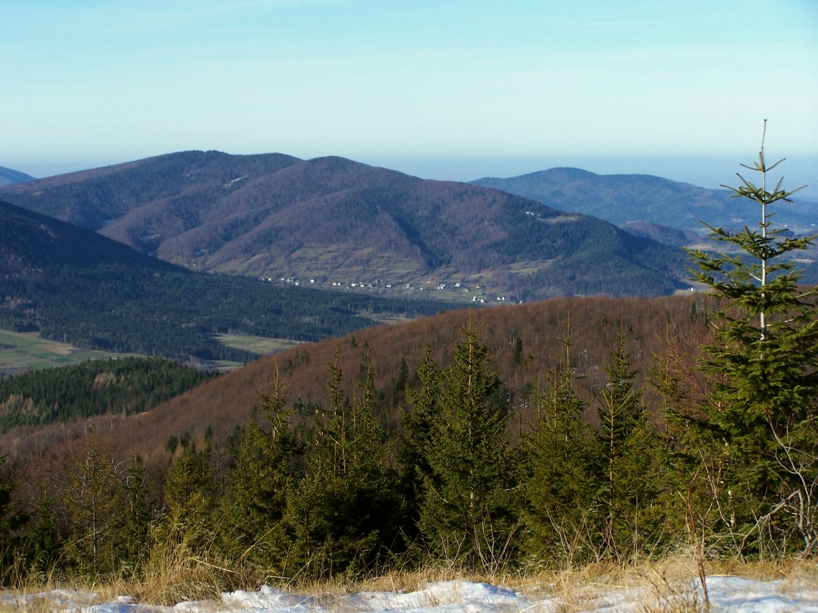 Śnieżnica (Beskid Wyspowy)